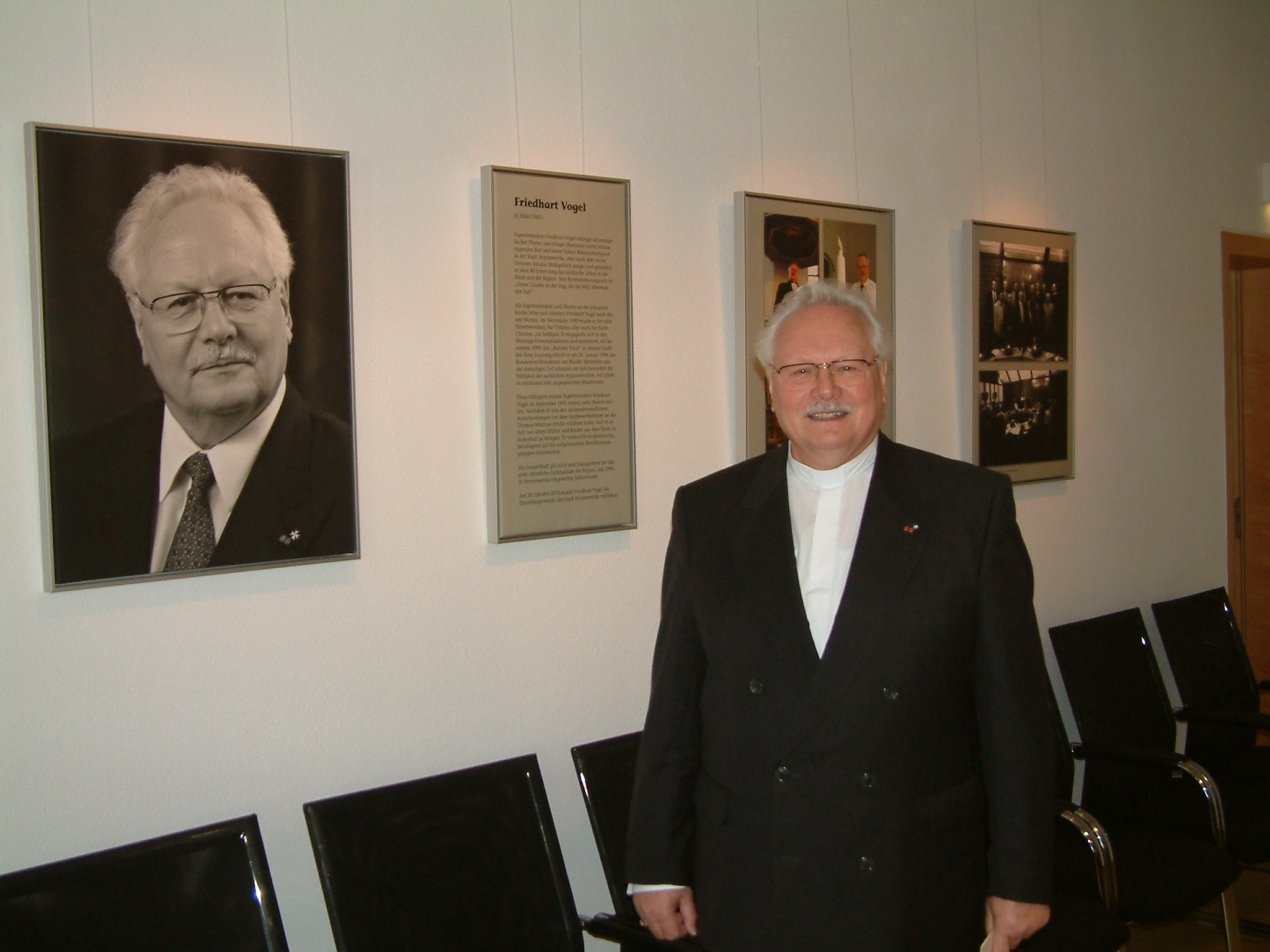 Superintendent i. R. Friedhart Vogel vor seinem Konterfei im neu gestalteten Sitzungssaal des historischen Rathauses von Hoyerswerda. Hier trug er sich wenig später als erster Hoyerswerdaer in das Goldene Buch der Stadt ein und wurde am selben Tag im Schloss zum Ehrenbürger der Stadt ernannt.